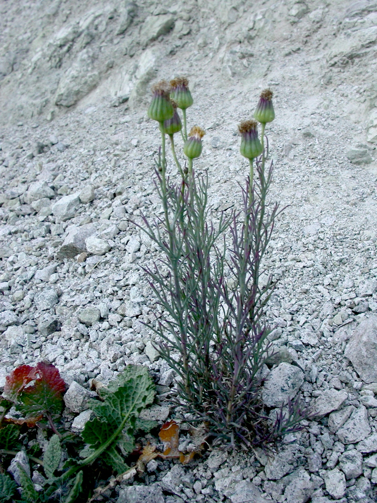 Senecio tripinnatifidus